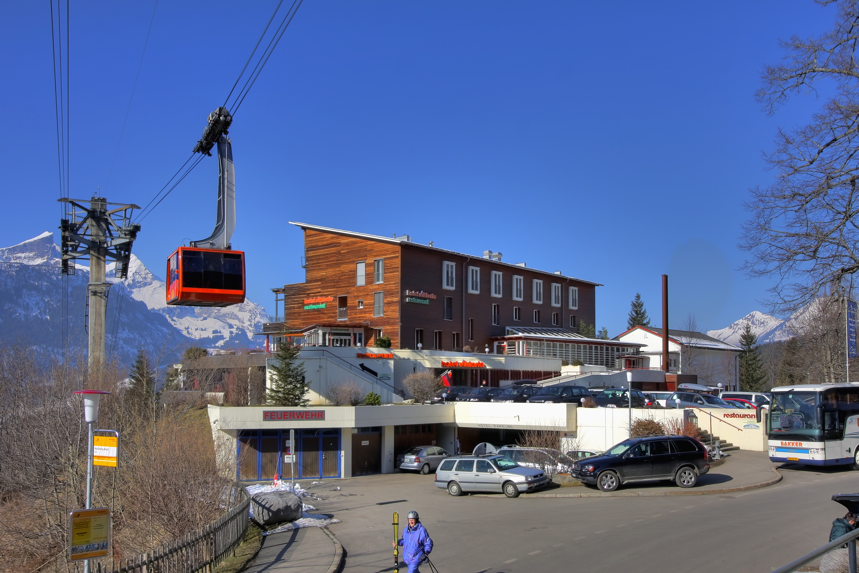 Luftseilbahn Meiringen-Hasliberg Reuti, in Reuti kurz vor der Endstation